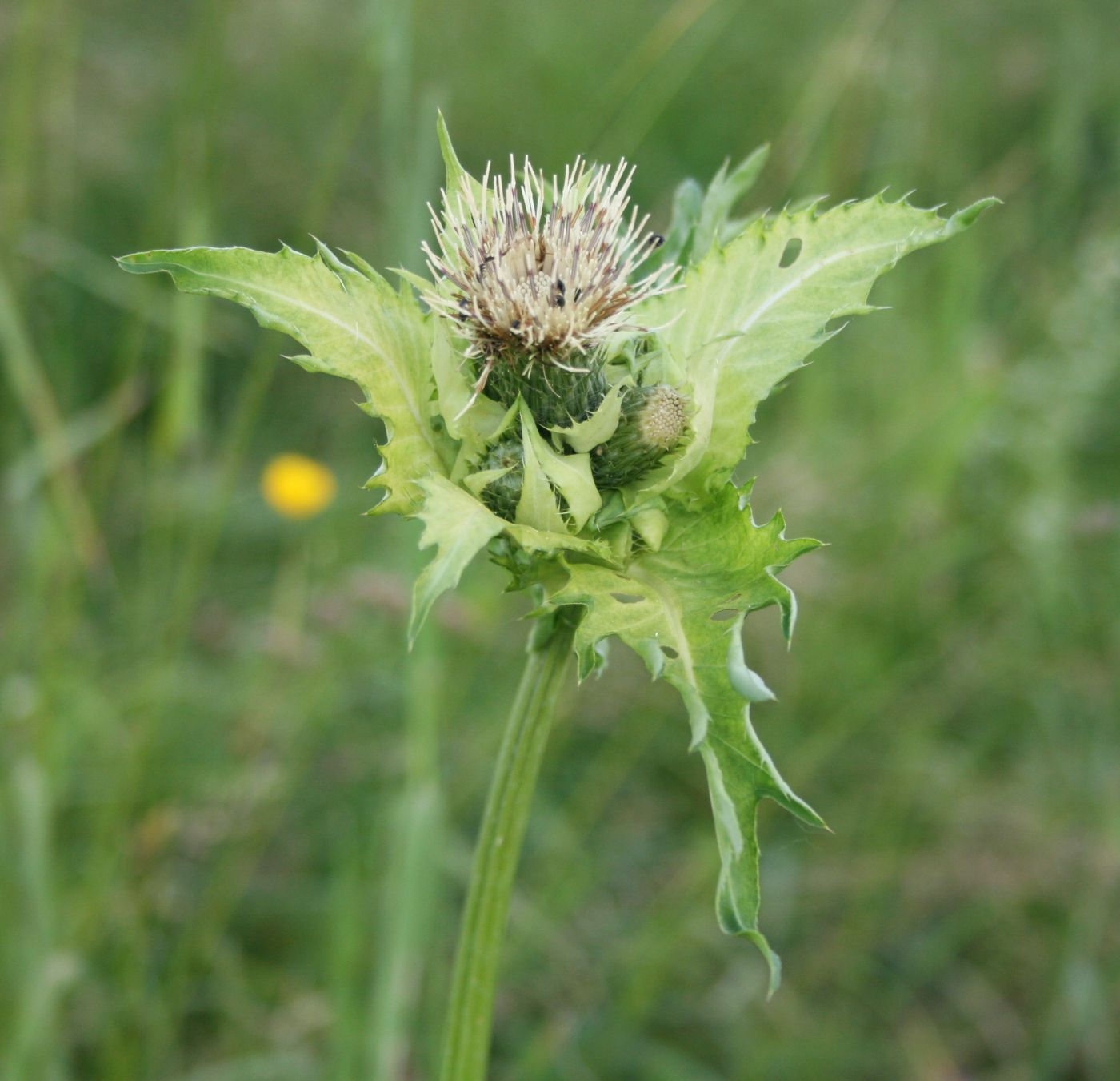 Kohl-Kratzdistel (Cirsium oleraceum), Korbblütler (Asteraceae) - Österreich/Austria/Autriche: Oberösterreich, Hausruckviertel, Niederholzham N Schwanenstadt